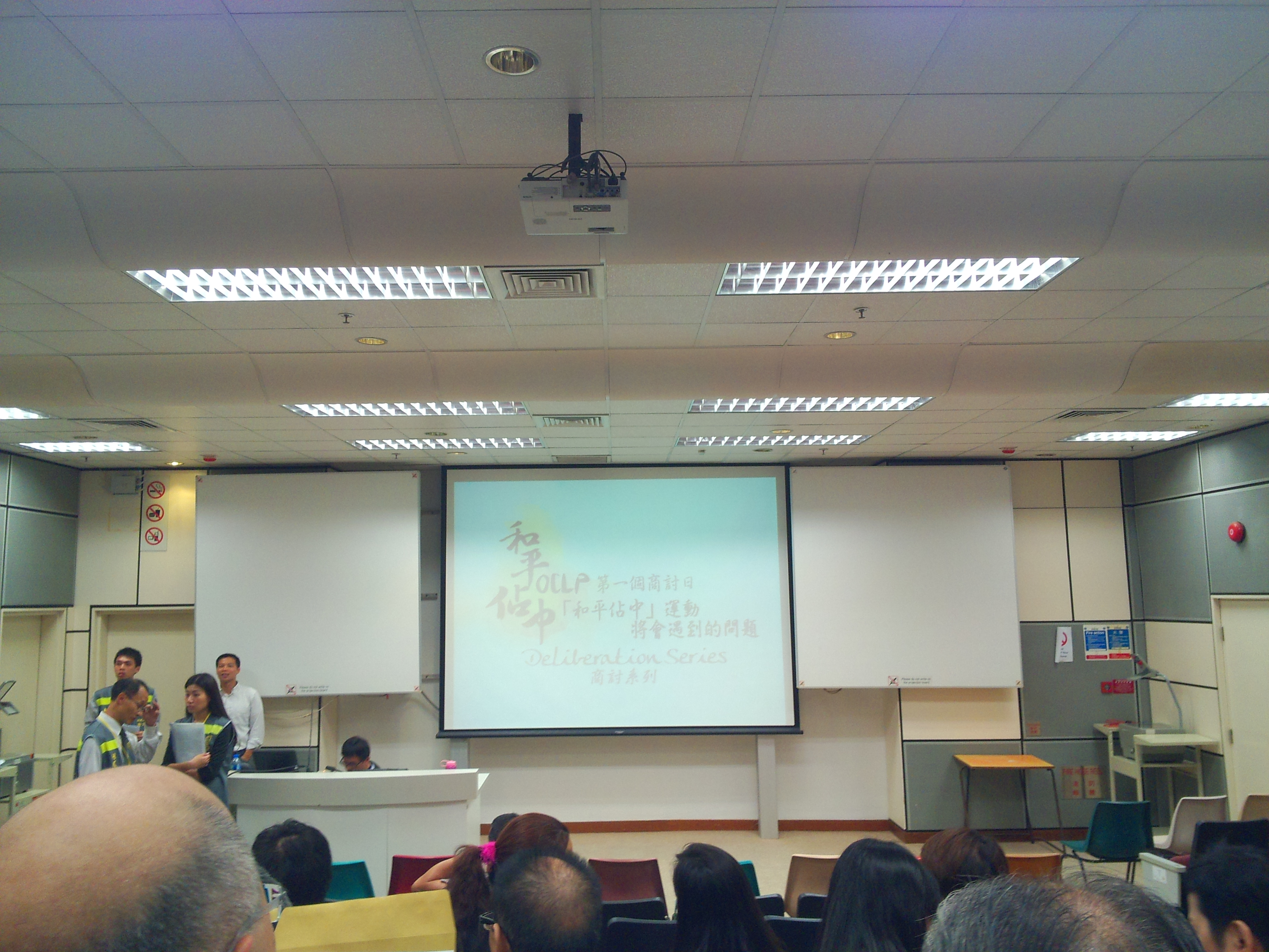 first day for deliberation